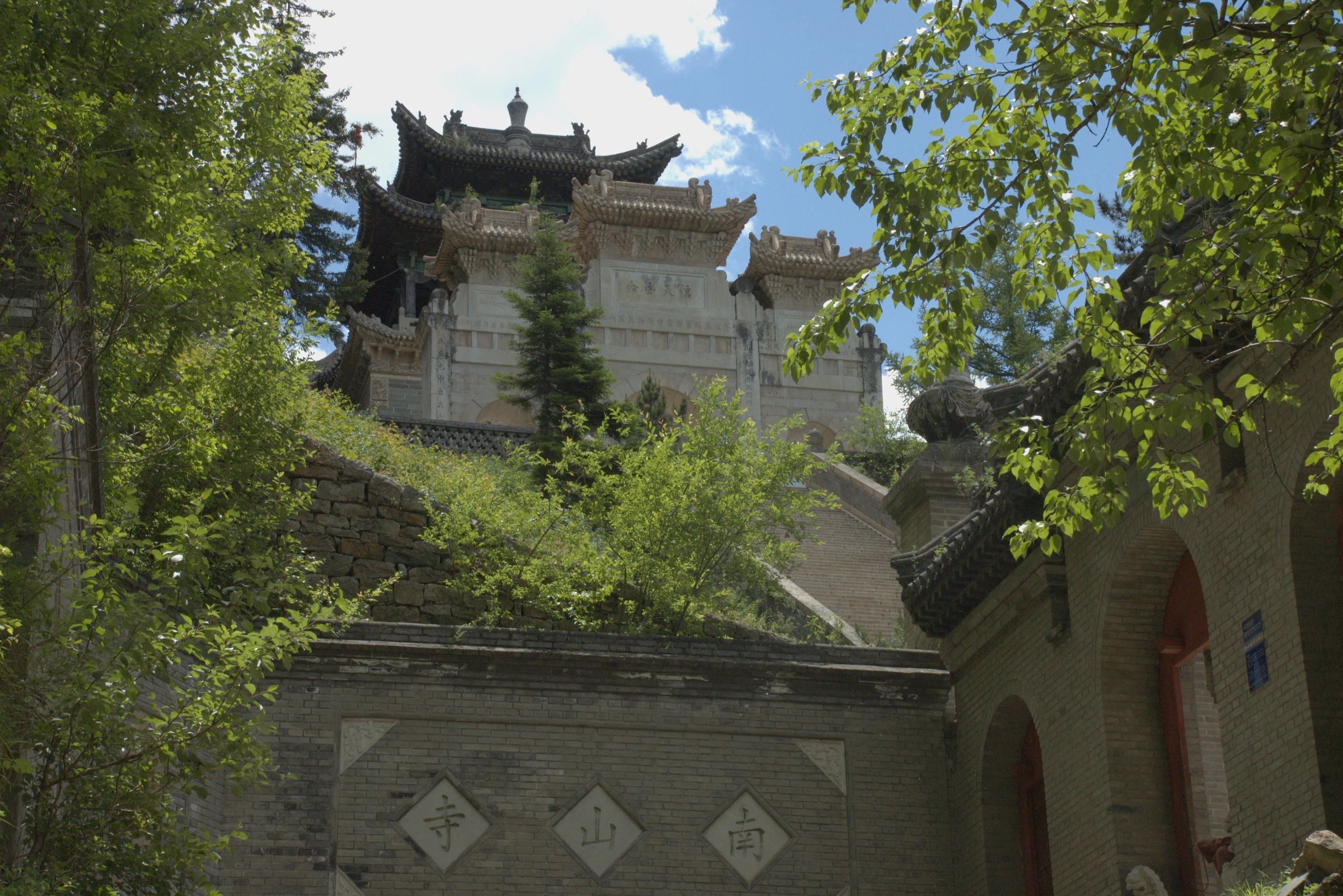 山西五台山南山寺